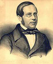 Friedrich August Eckstein (1810–1885), deutscher klassischer Philologe